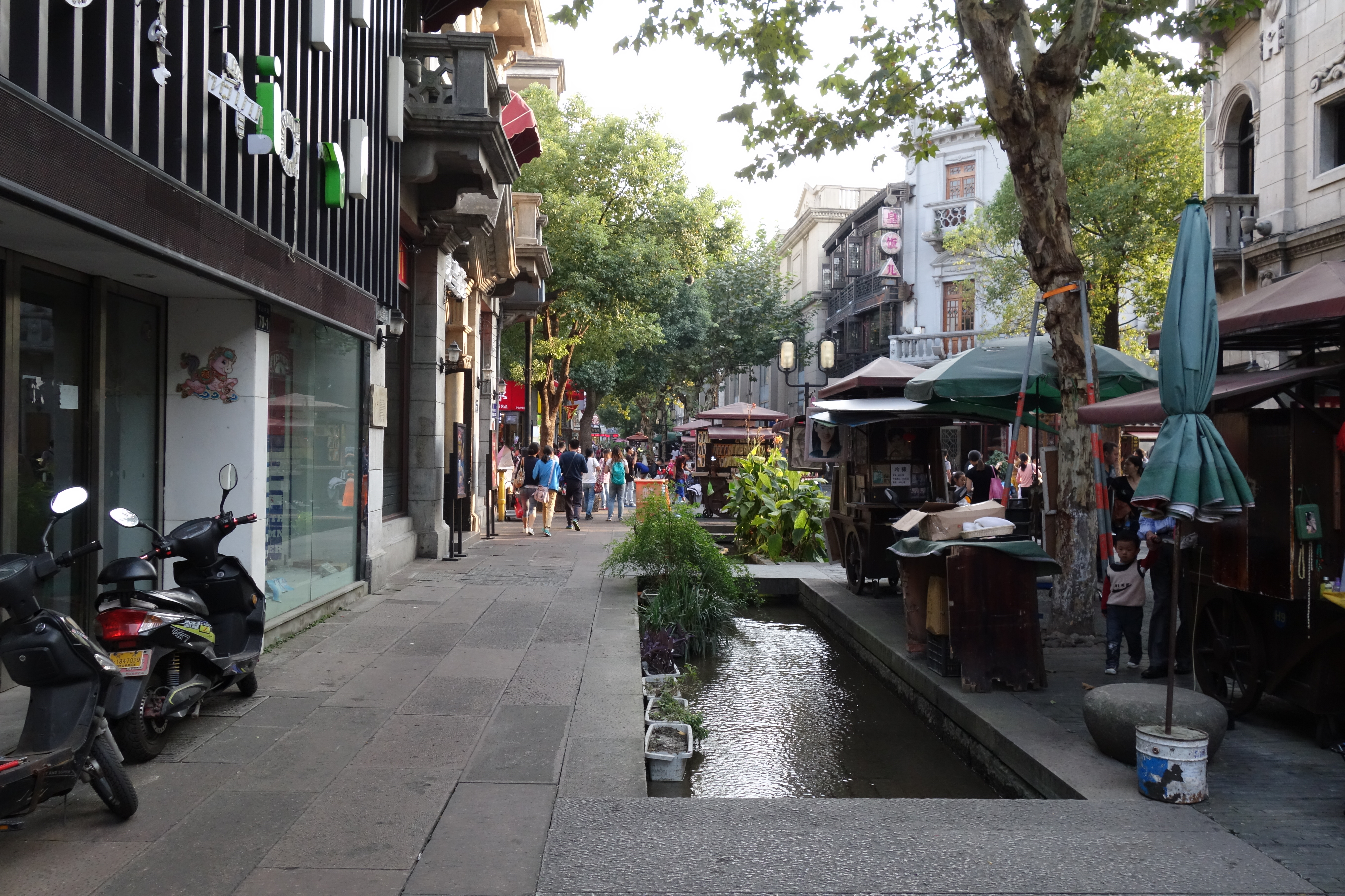 杭州南宋御街